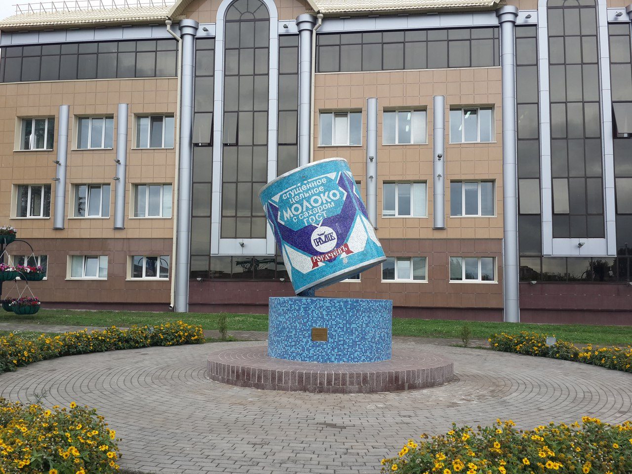 Памятник банке сгущенного молока в г. Рогачеве